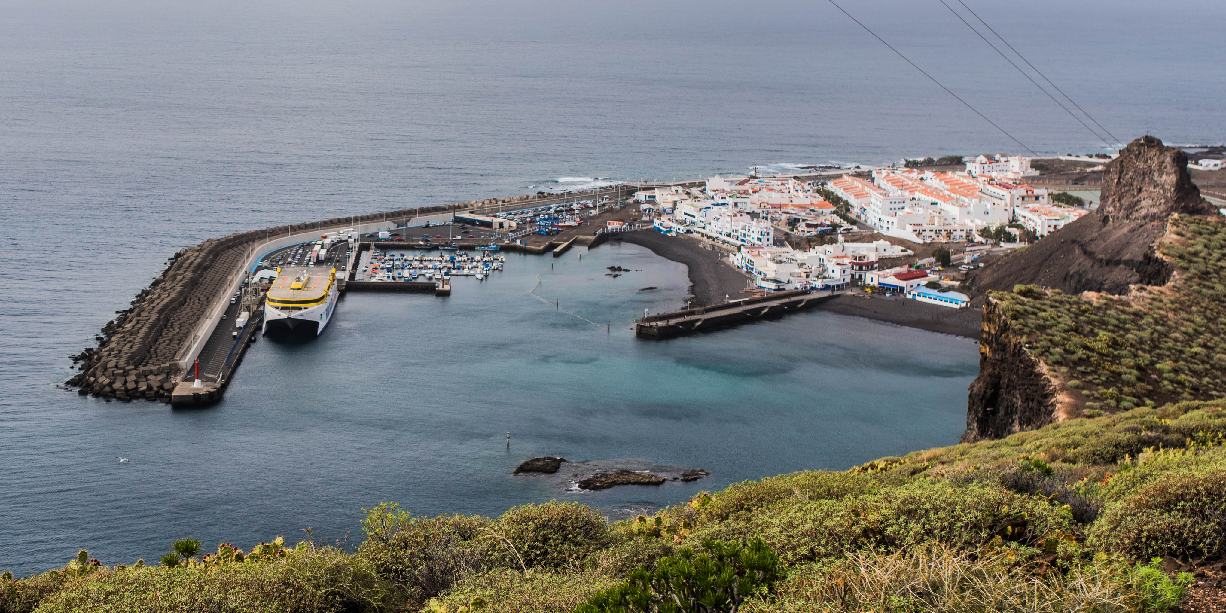 Agaete, Gran Canaria